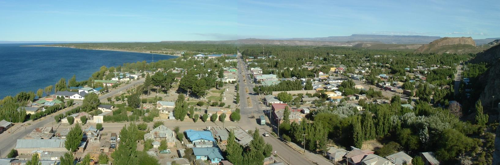 Foto panorámica de Chile Chico, en la Patagonia Chilena, Chile. Vista desde el mirador del cerro Las Banderas. Son dos fotos unidas usando el avanzado programa Paint.